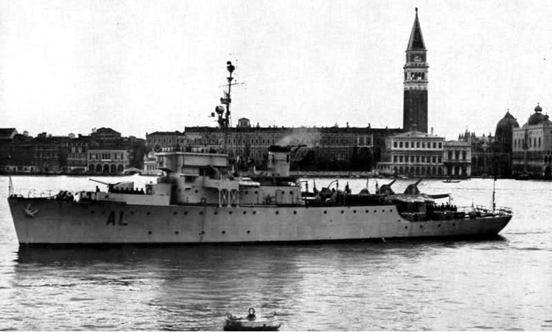 La corvetta Alabarda nei primi anni ‘50 a Venezia. La foto è antecedente all'introduzione del distintivo ottico nemerale da parte della Marina Militare Italiana avvenuta nel 1952 Foto tratta da: ESPLORATORI FREGATE CORVETTE ED AVVISI ITALIANI 1861-1968 F. Bargoni, F. Gay Ufficio Storico della Marina Militare Roma 1969